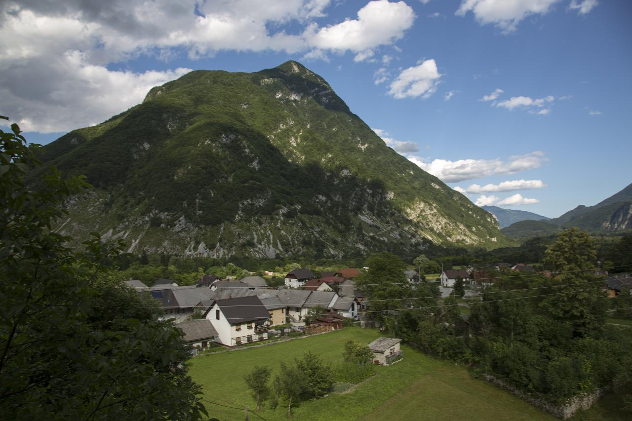 Žaga, Slovenia